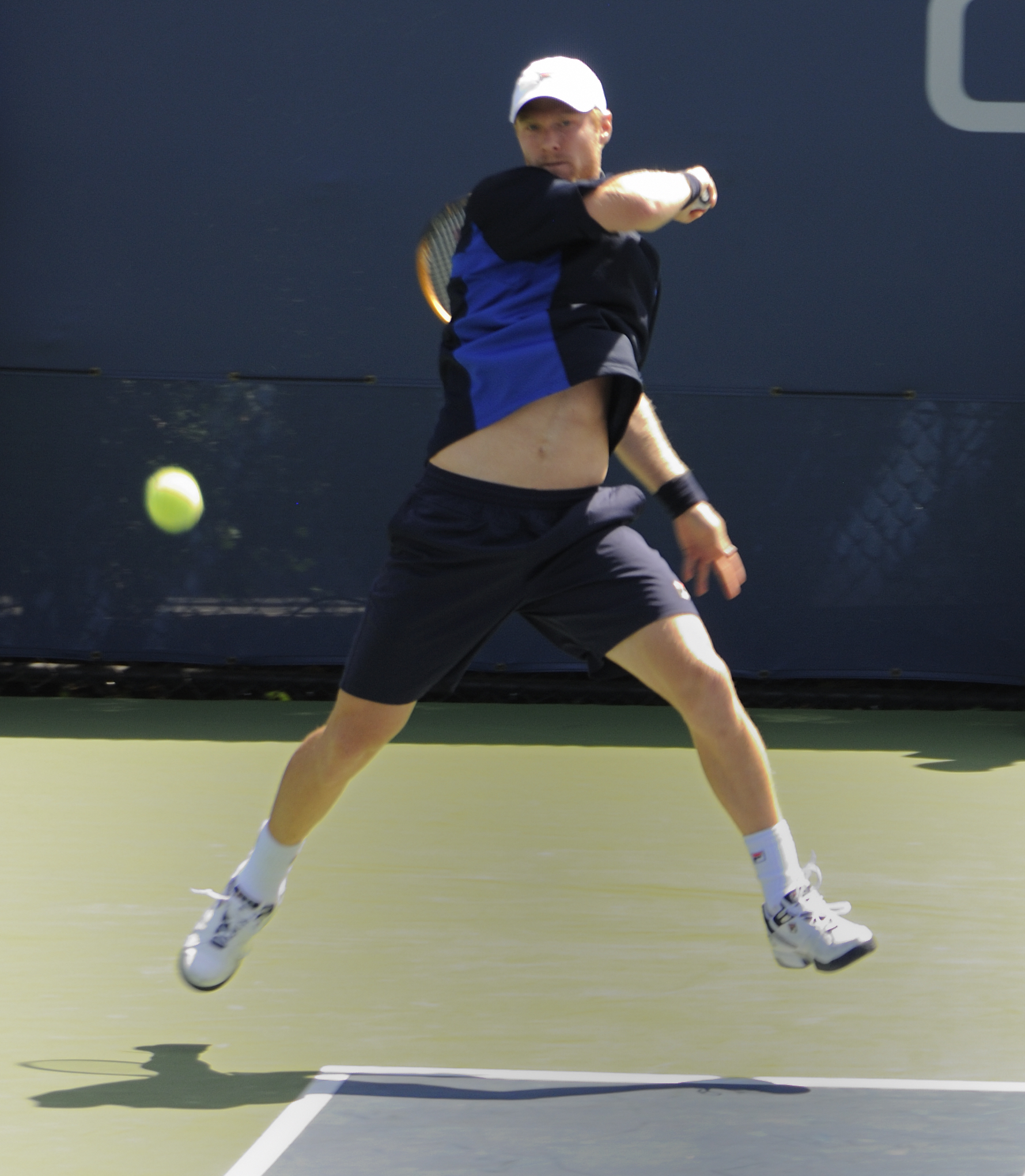 Dmitry Tursunov at 2008 US Open